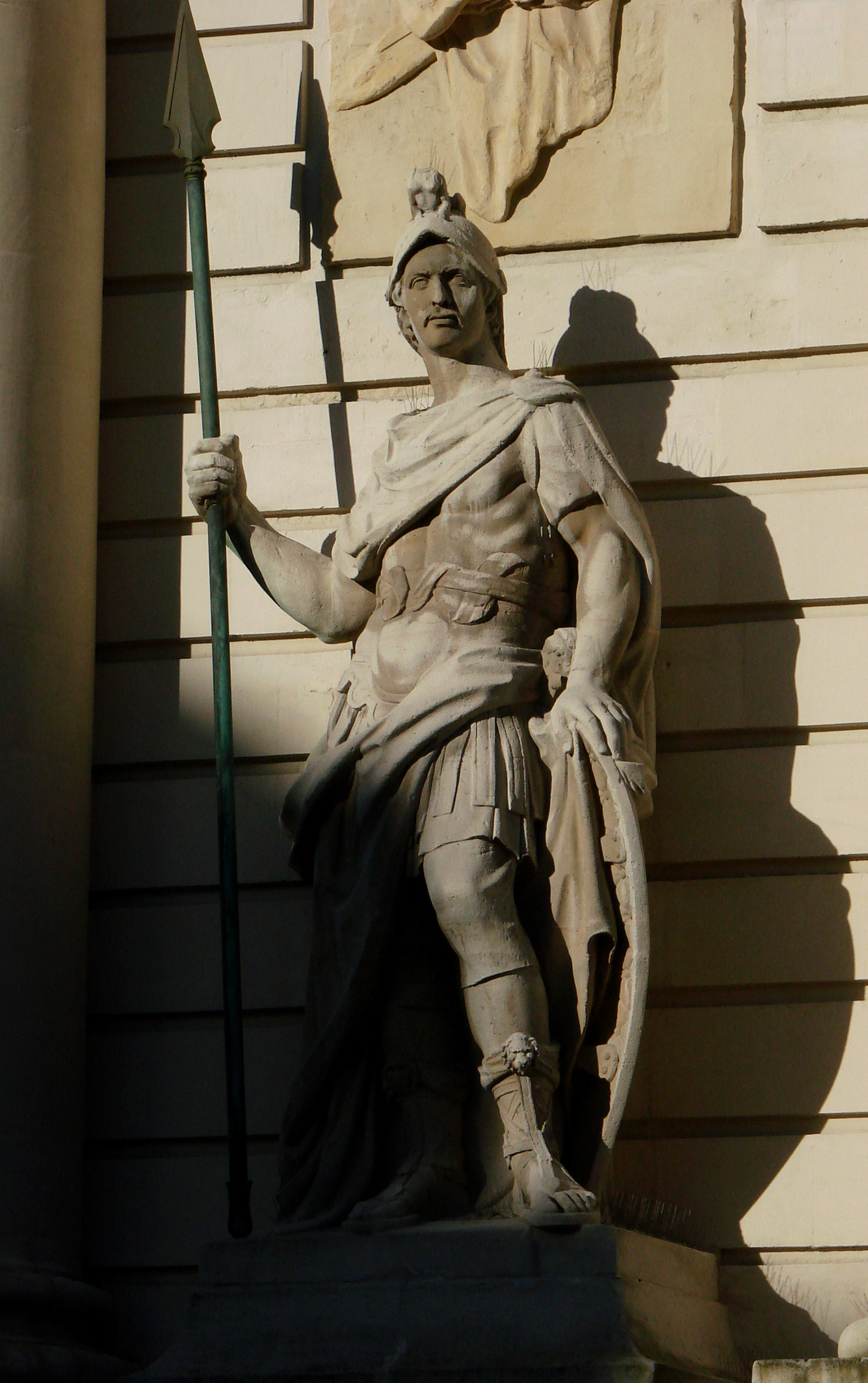 Statue de Mars ornant la Porte de Paris à Lille, fin du 17ème siècle.